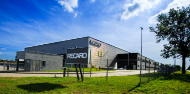 RECARO Aircraft Seating, Firmengebäude